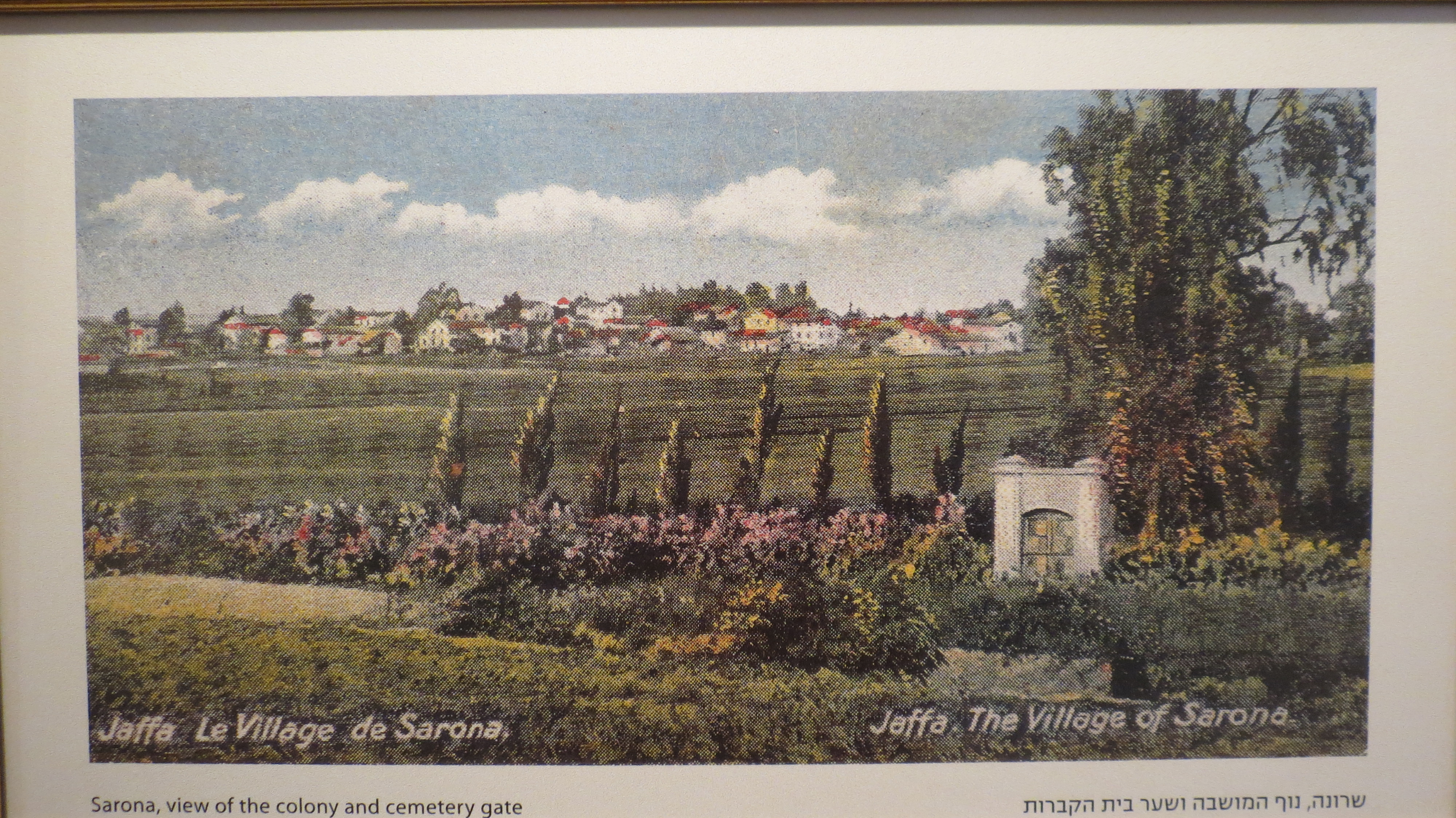 Sarona Market, Tel Aviv שרונה מרקט